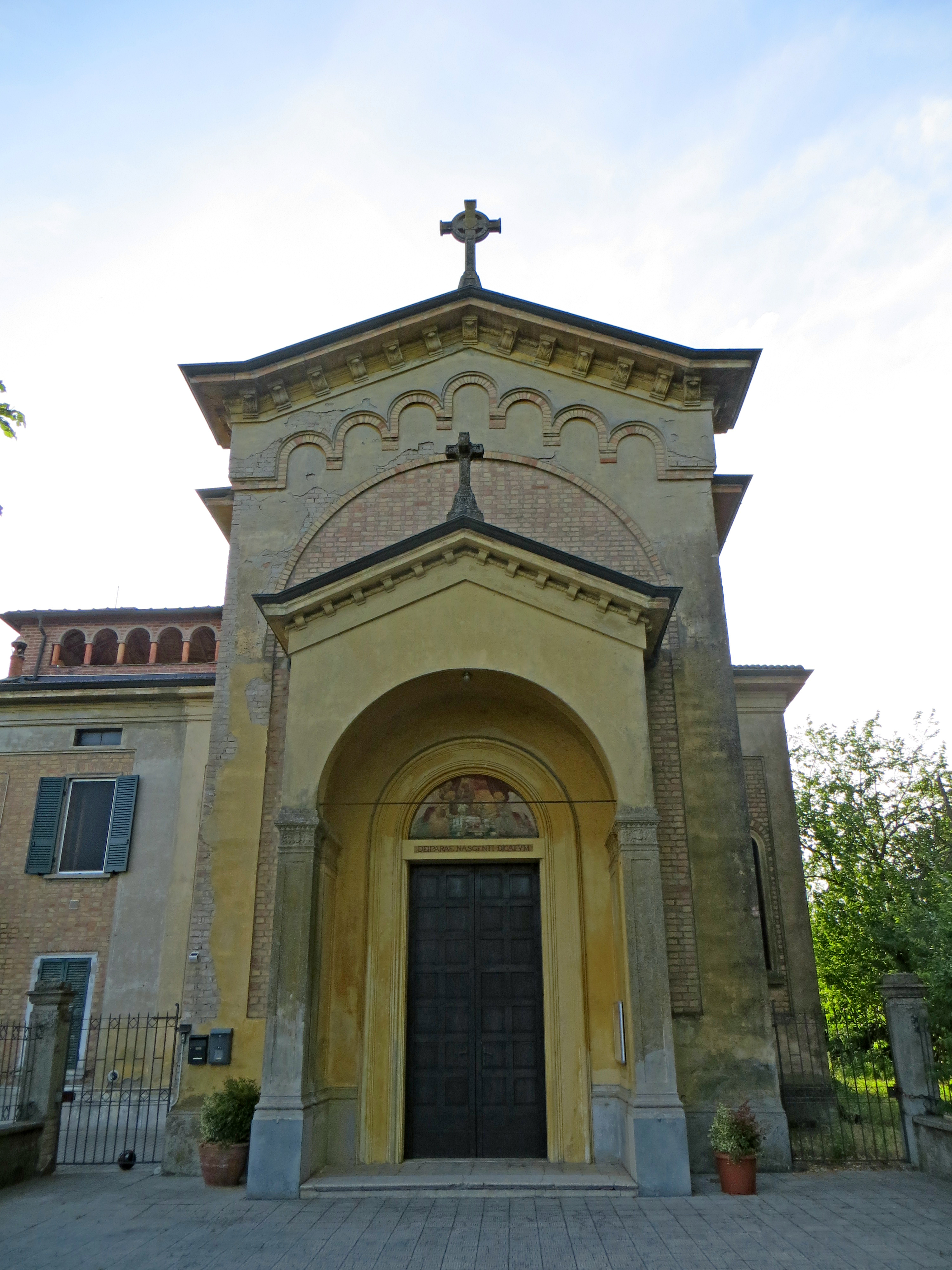 Chiesa della Natività di Maria Vergine (Baganzolino, Parma) - facciata